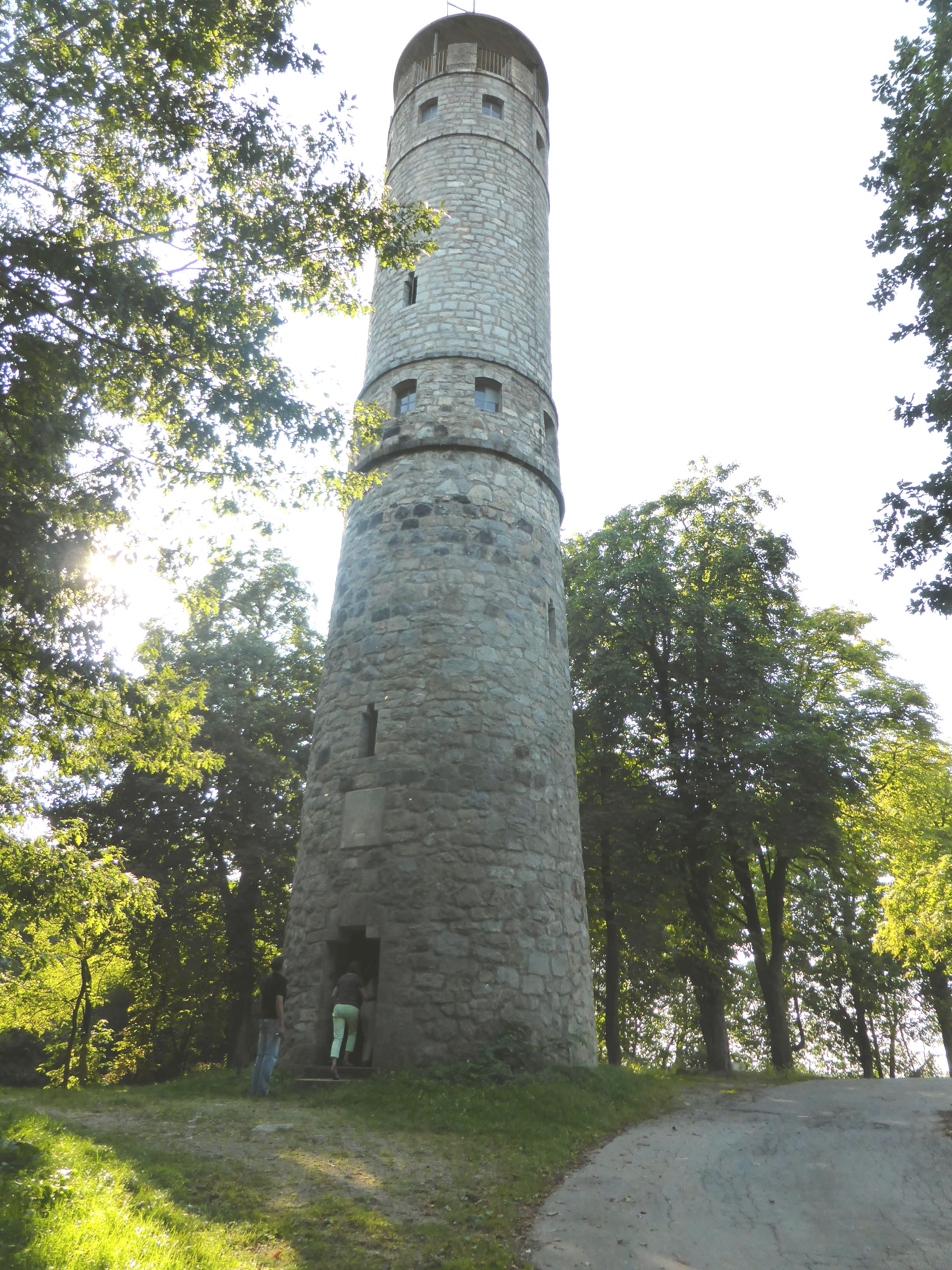 Luitpoldturm bei Katzberg